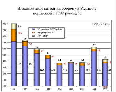 Динаміка змін витрат на оборону 1992-2000